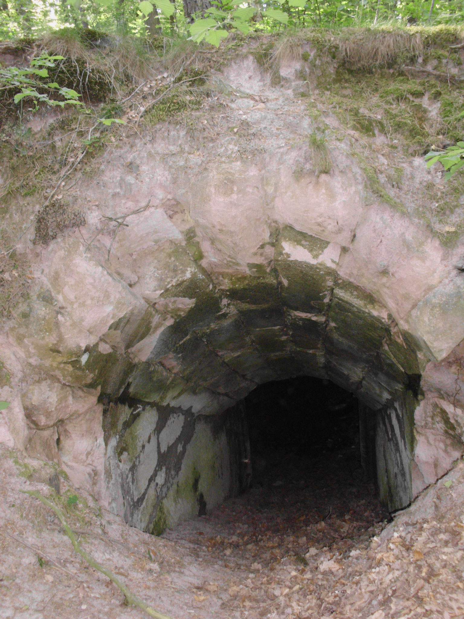 Brauereikeller an der Straße von Muhr am See nach Wehlenberg, einem Ortsteil von Muhr an See im mittelfränkischen Landkreis Weißenburg-Gunzenhausen